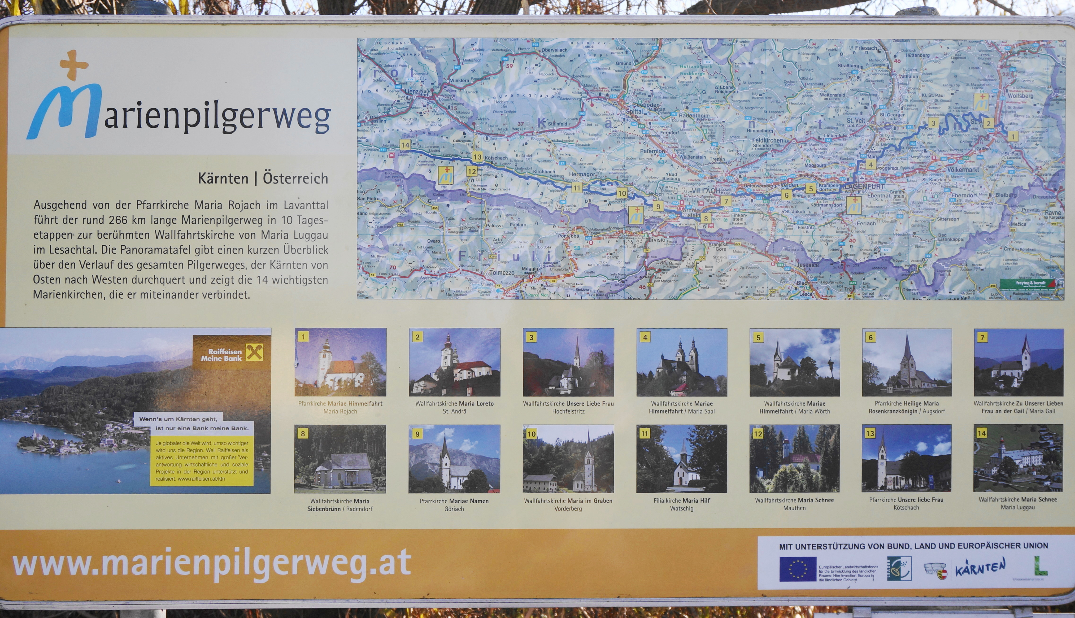 Panoramatafel Marienpilgerweg Kärnten - Österreich. 266 km in 10 Tages Etappen ausgehend von Maria Rojach im Lavanttal bis Maria Luggau im Lesachtal, Kärnten, Österreich, EU